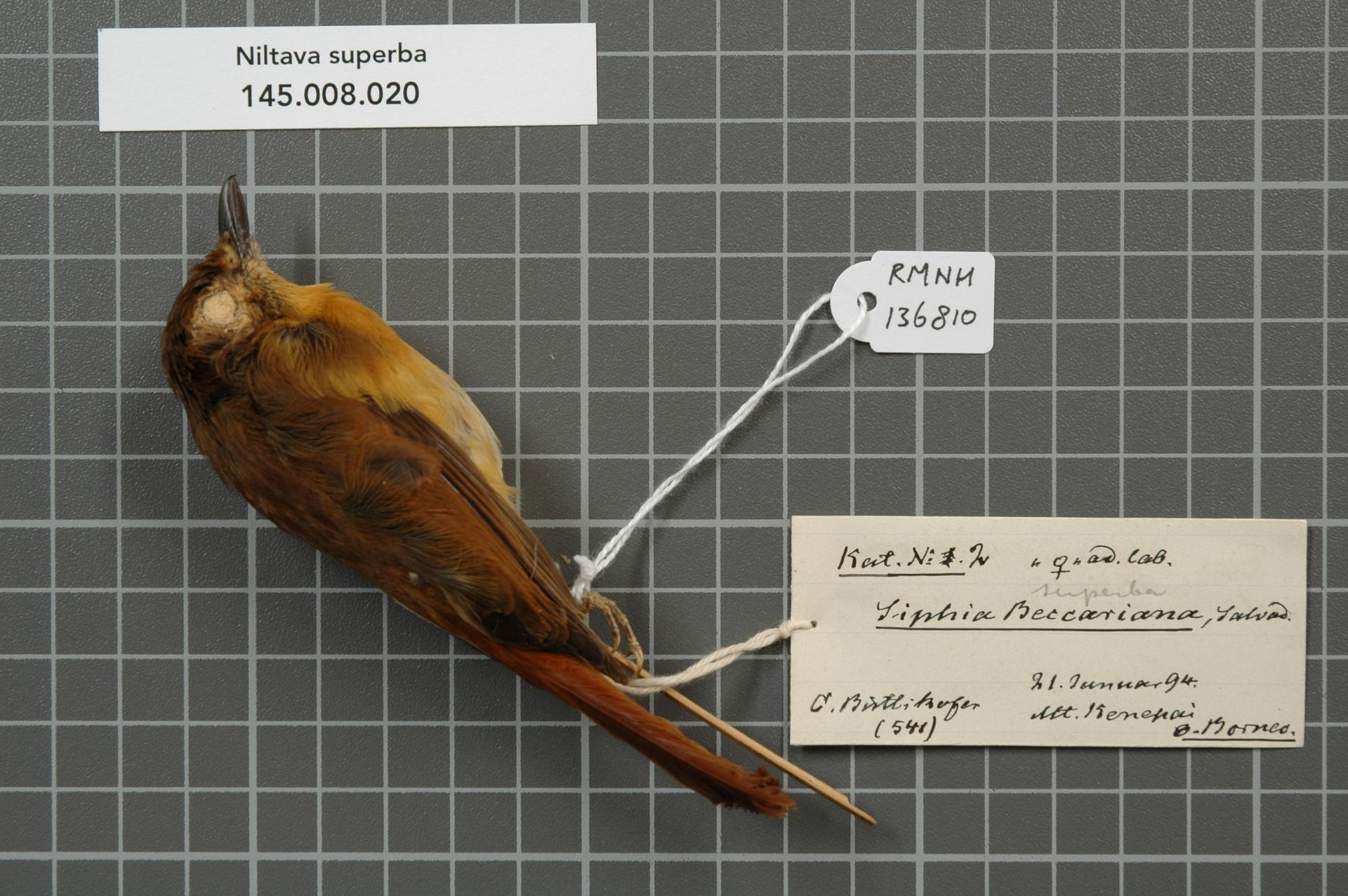 Niltava superba (Stresemann, 1925)